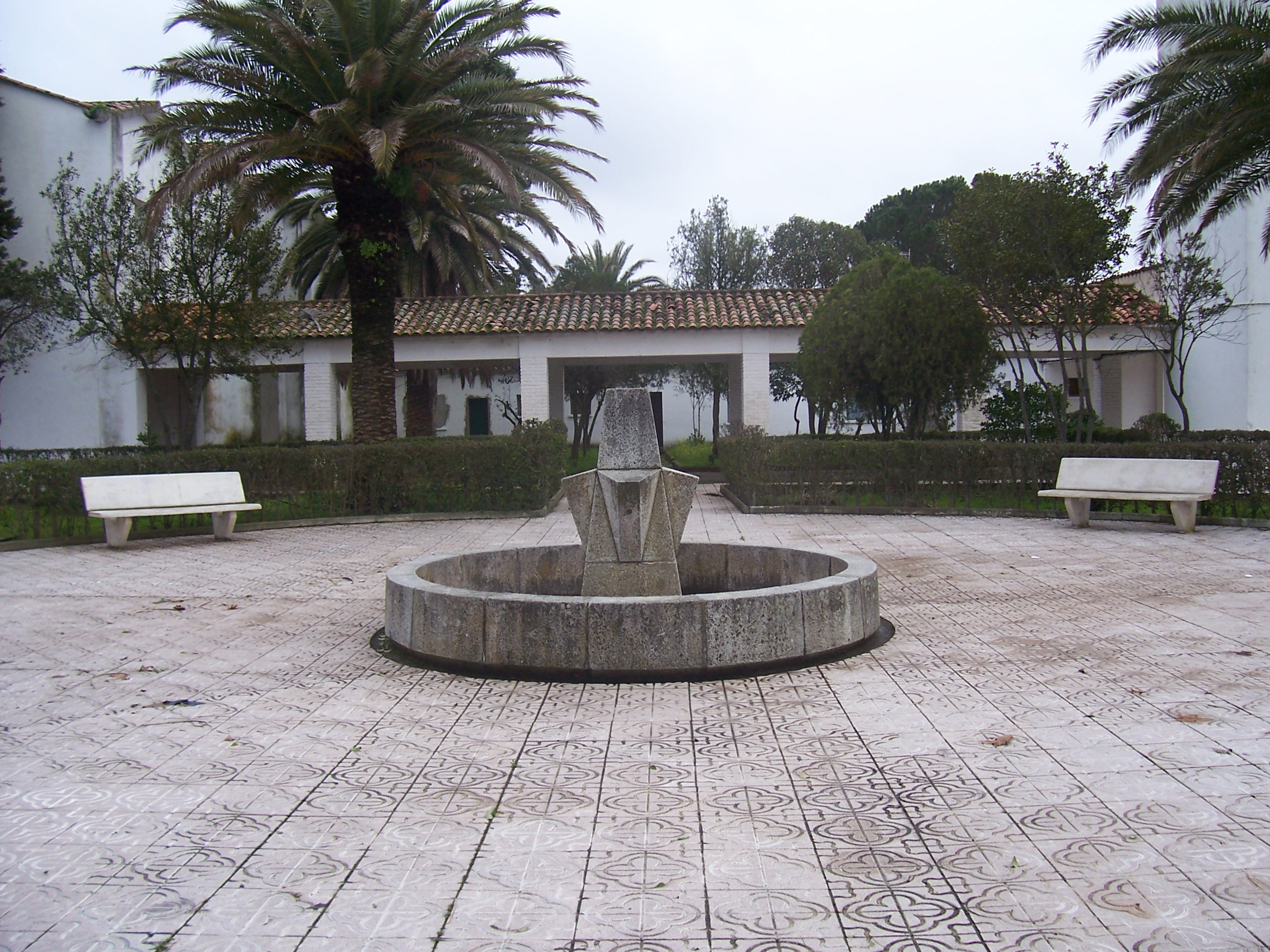 Fuente en Valdencín, municipio de Torrejoncillo, provincia de Cáceres, España.